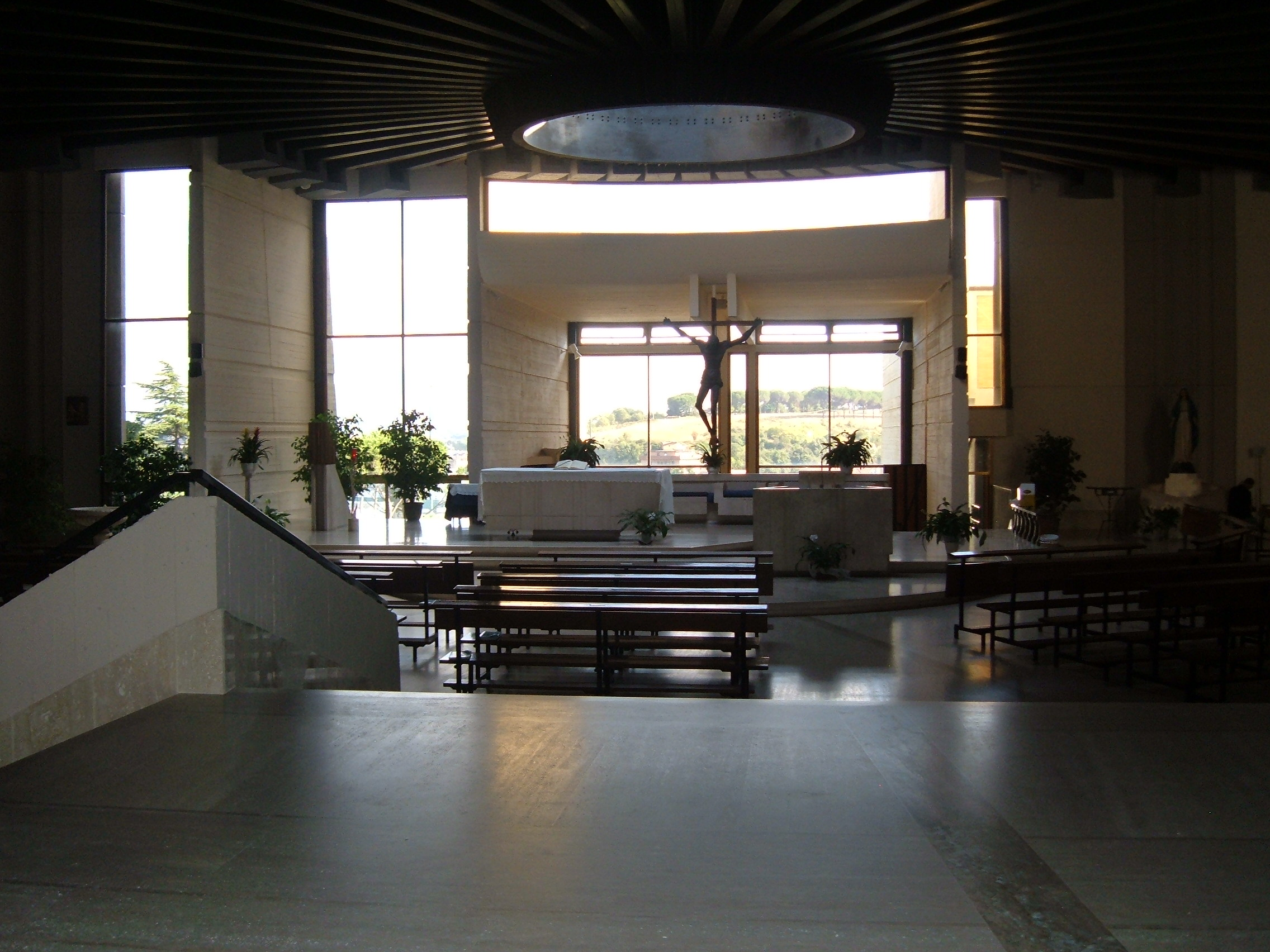 Chiesa di San Melchiade (papa Milziade), a Roma, in zona Labaro, in via Costantiniana. Interno.